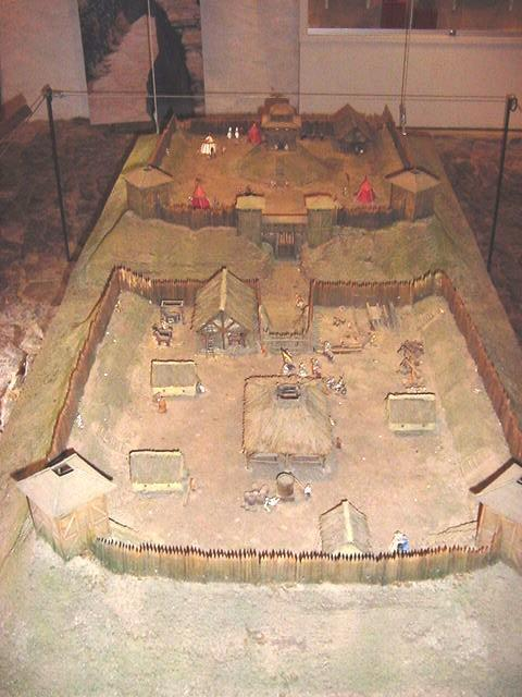 Maquette du camp des anglais à Ste-Suzanne (Mayenne- France)